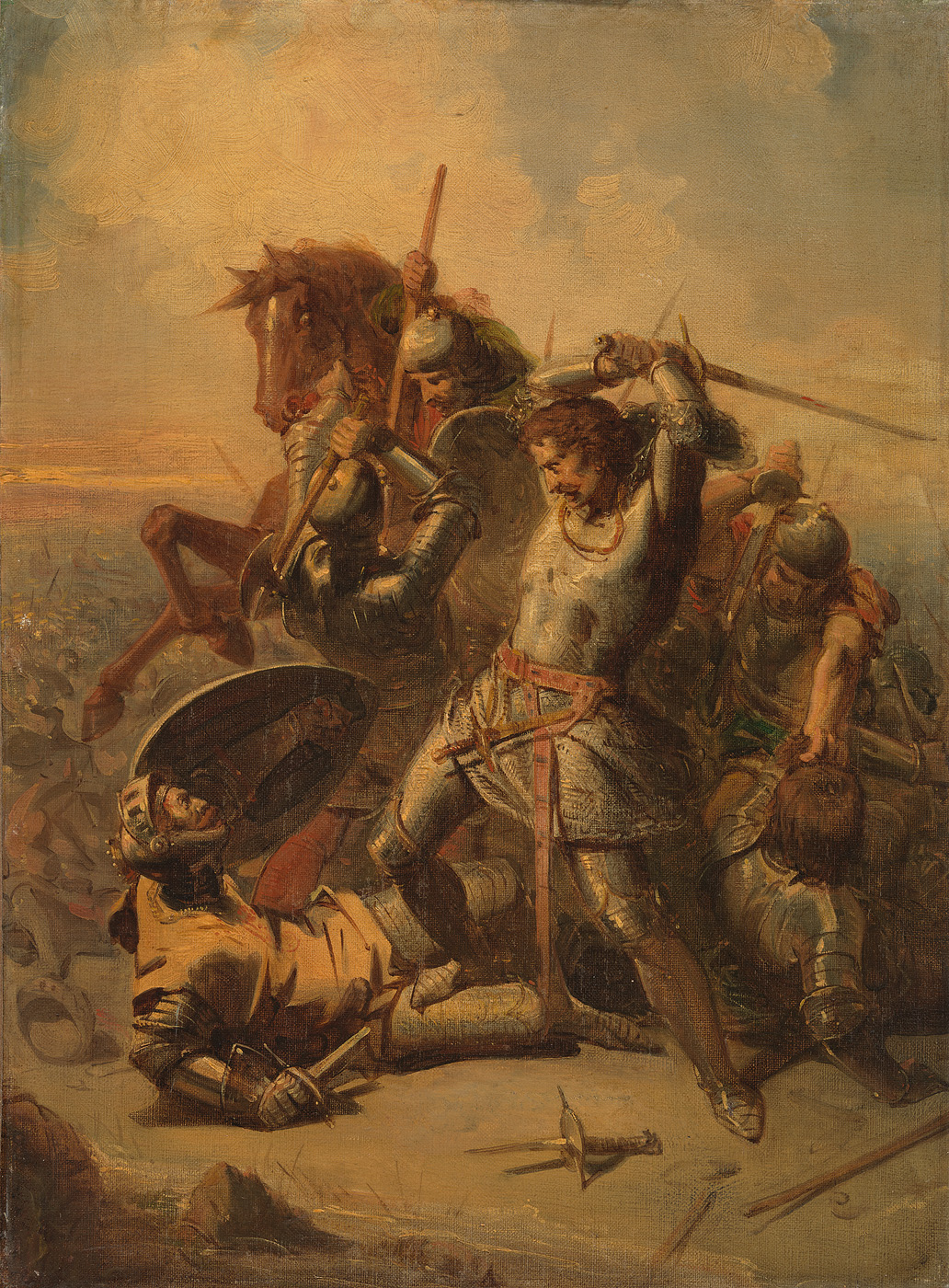 schilderij; Vos, Jacob de; geschiedenis (iconografie)